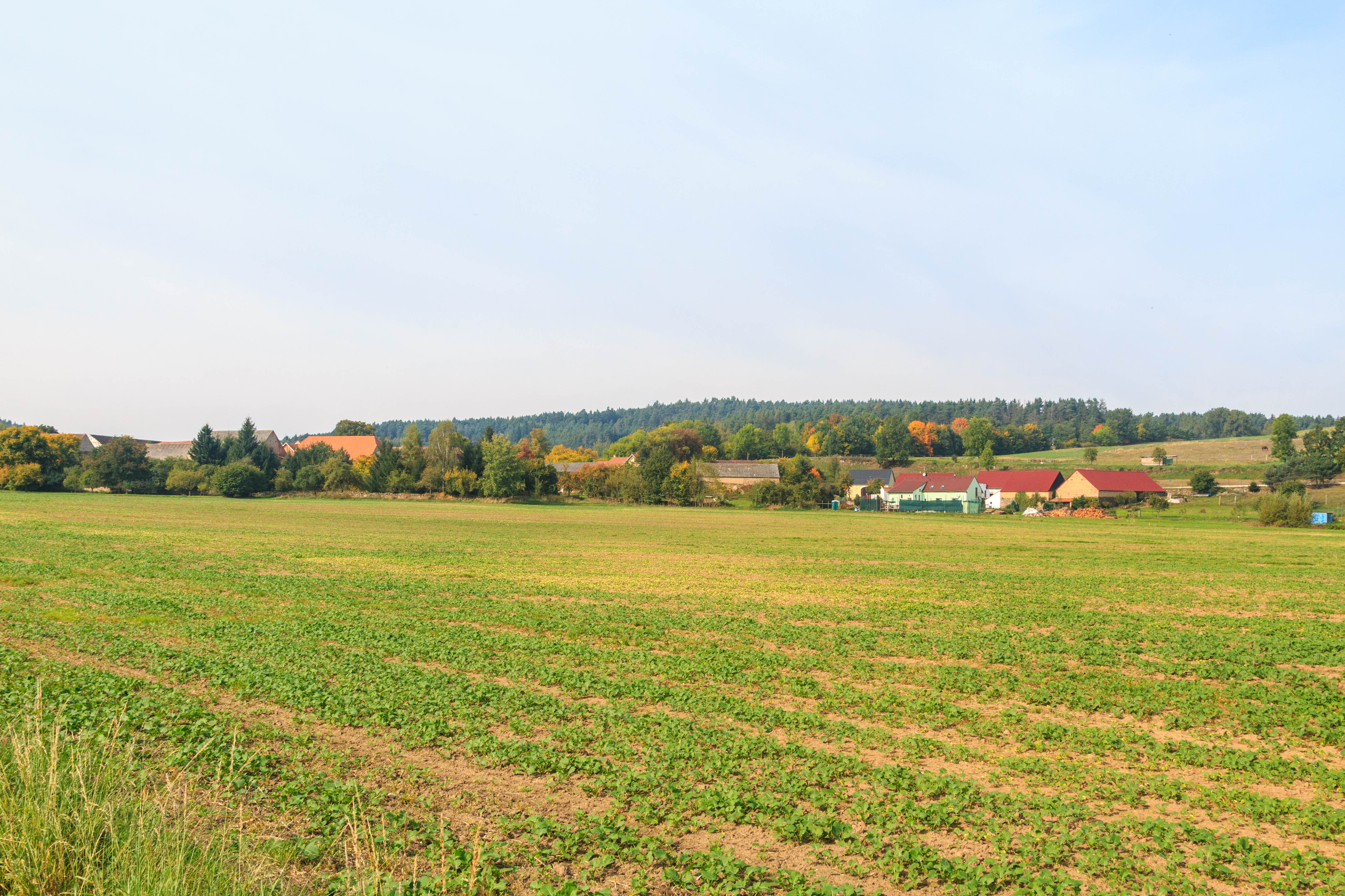 Třebohostice